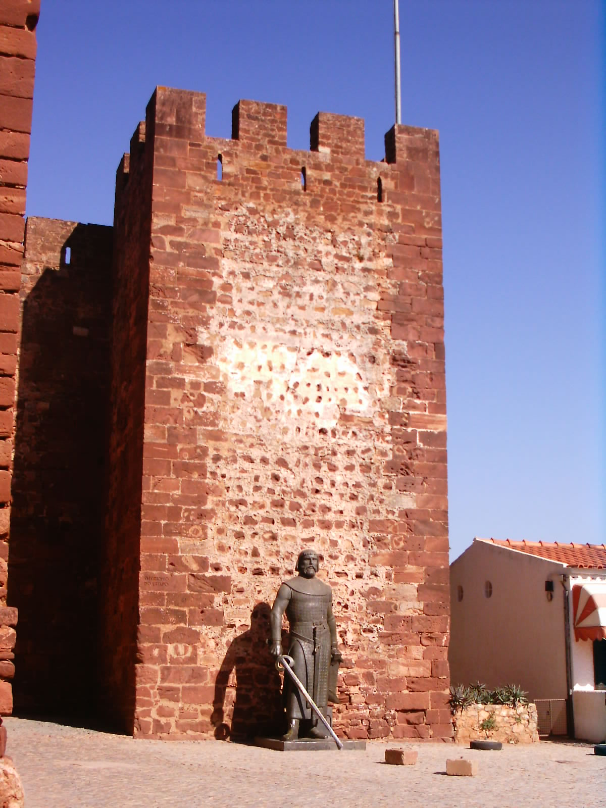 Castelo de Silves, Silves, Portugal. Estátua em bronze do rei Sancho I de Portugal, conquistador de Silves em 1189, à entrada do castelo.